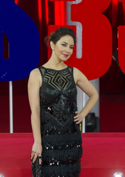 La actriz Mónica Godoy en gala realizada en el Teatro Municipal de Las Condes